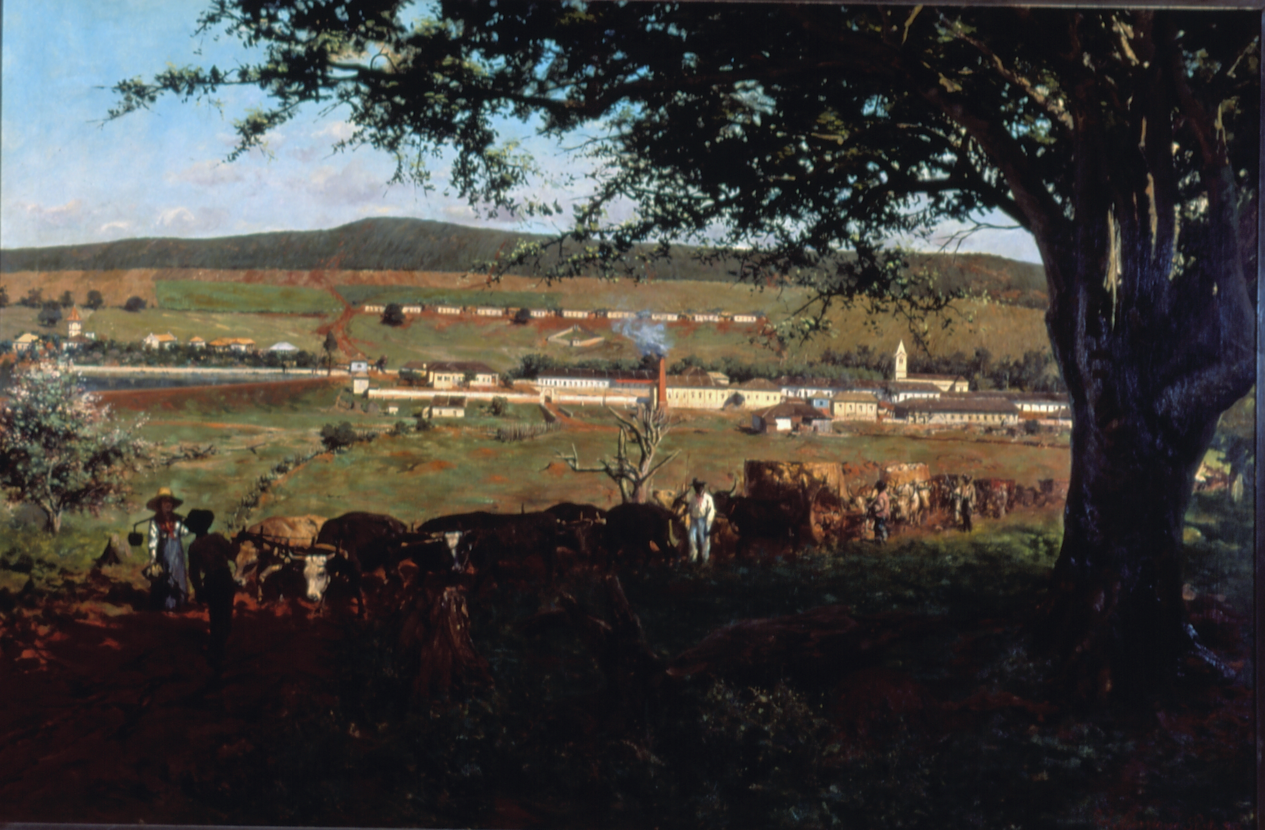 Obra que integra o acervo do Museu Paulista da USP. Coleção Fundo Museu Paulista - FMP